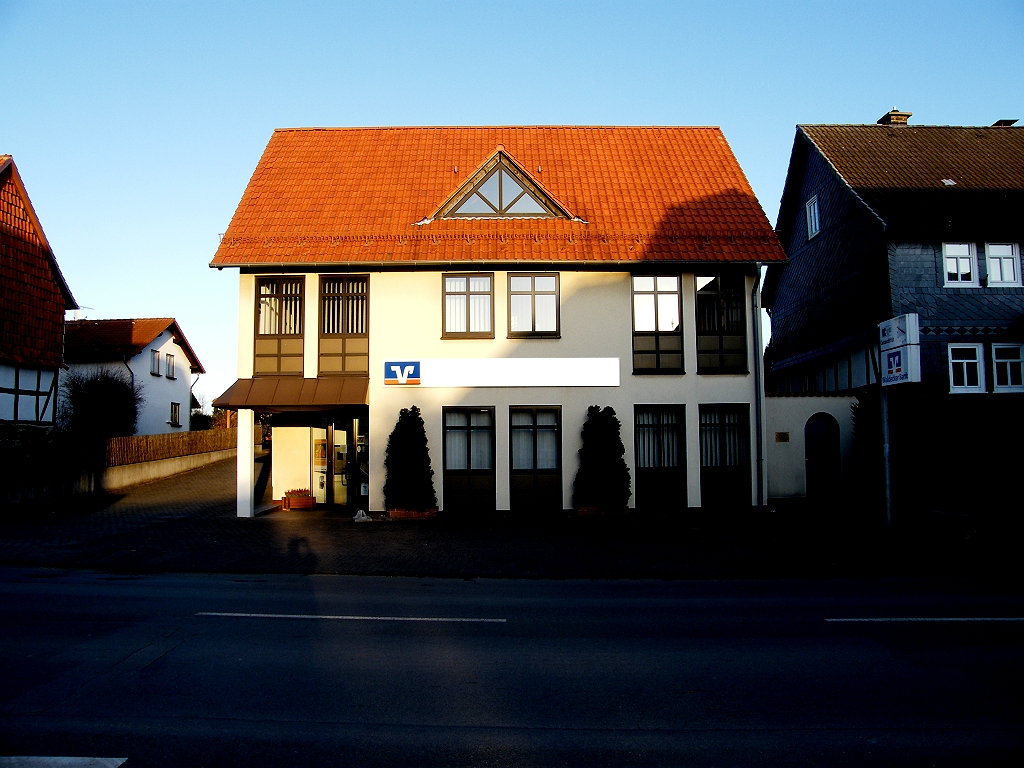 ehem. Synagoge in Höringhausen (heute Bank)